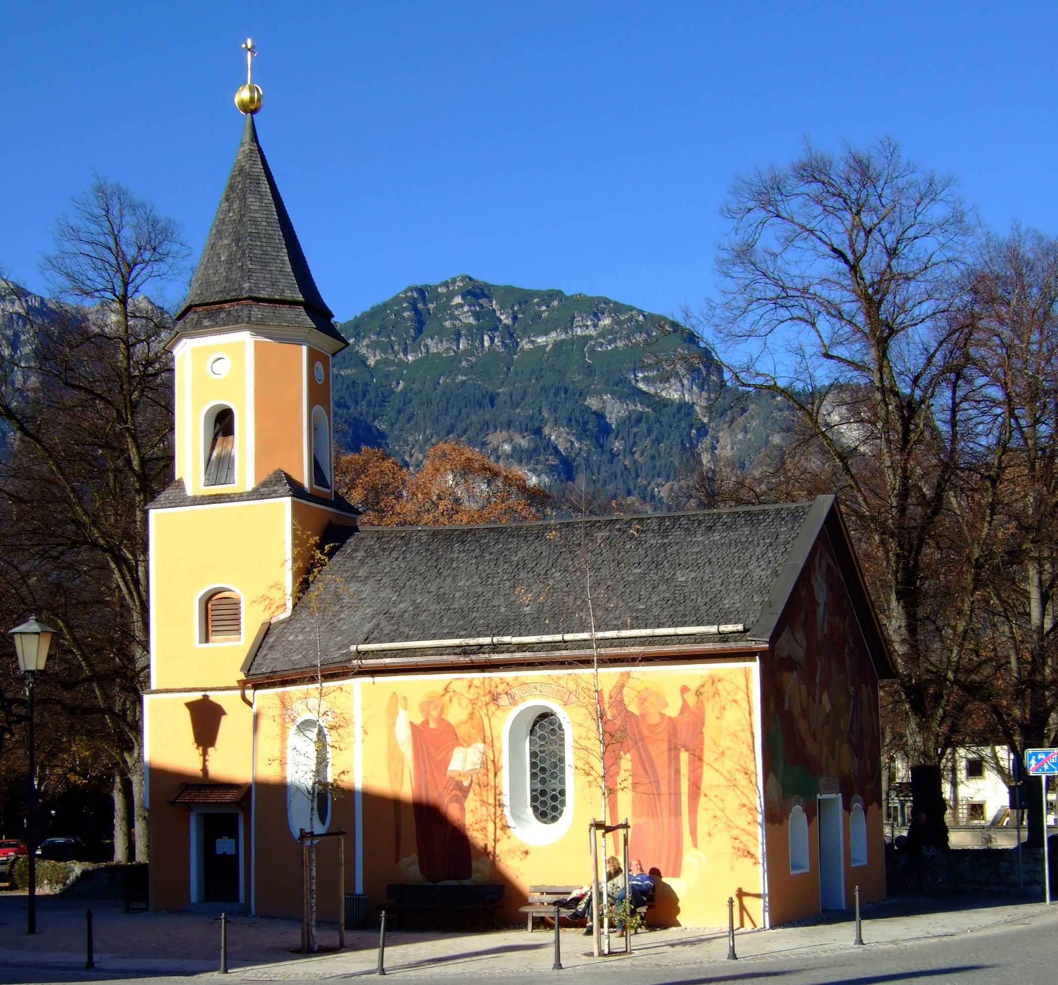 Pestkapelle in Partenkirchen